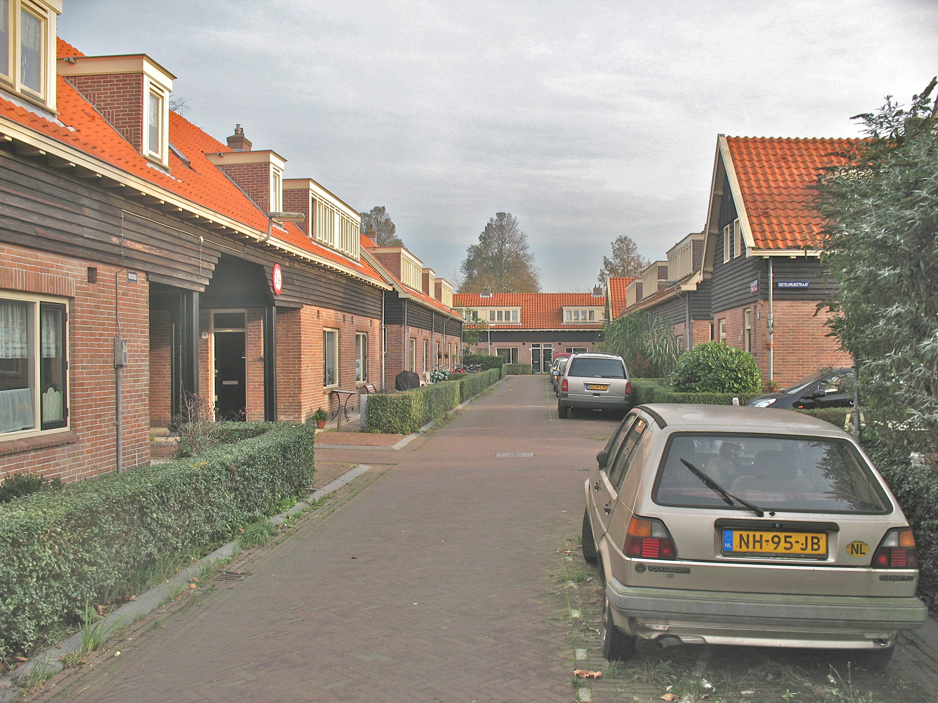 Woningen in de polder Buiksloterham, Amsterdam-Noord. Disteldorp, Lange Distelstraat.